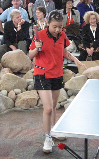 Ping Pong Player Ariel Hsing in May 2007 at Berkshire Hathaway.